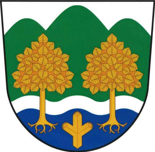 Krhová znak